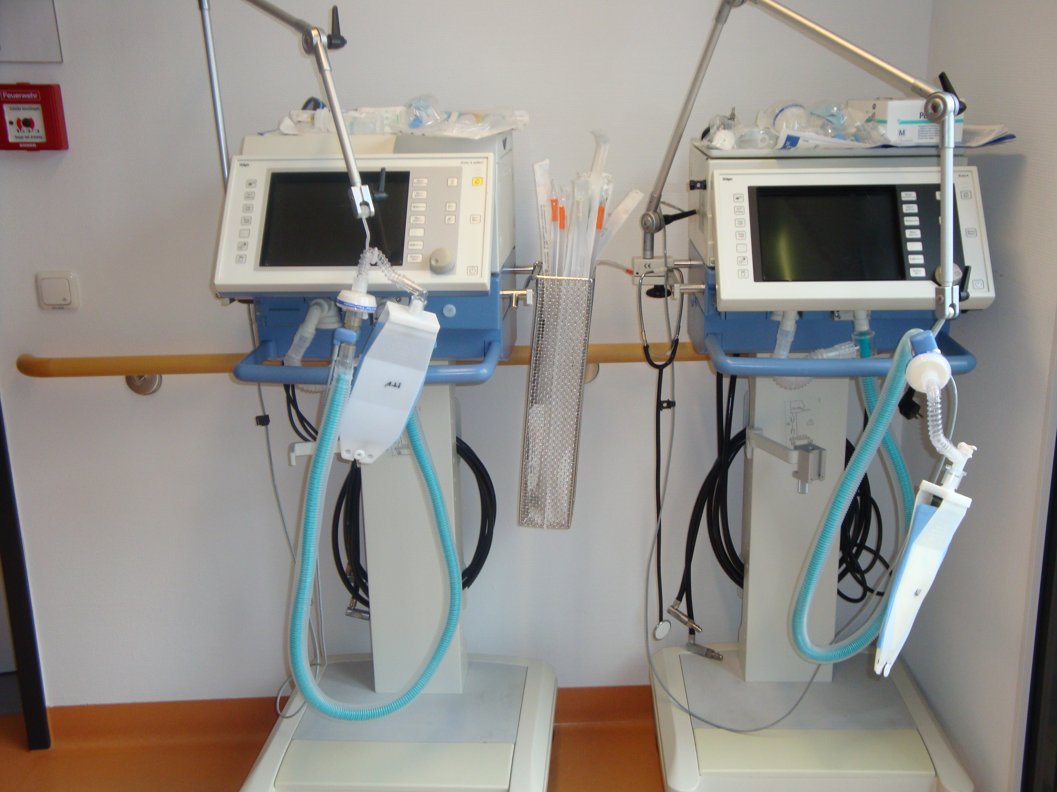 Süni tənəffüs aparatı